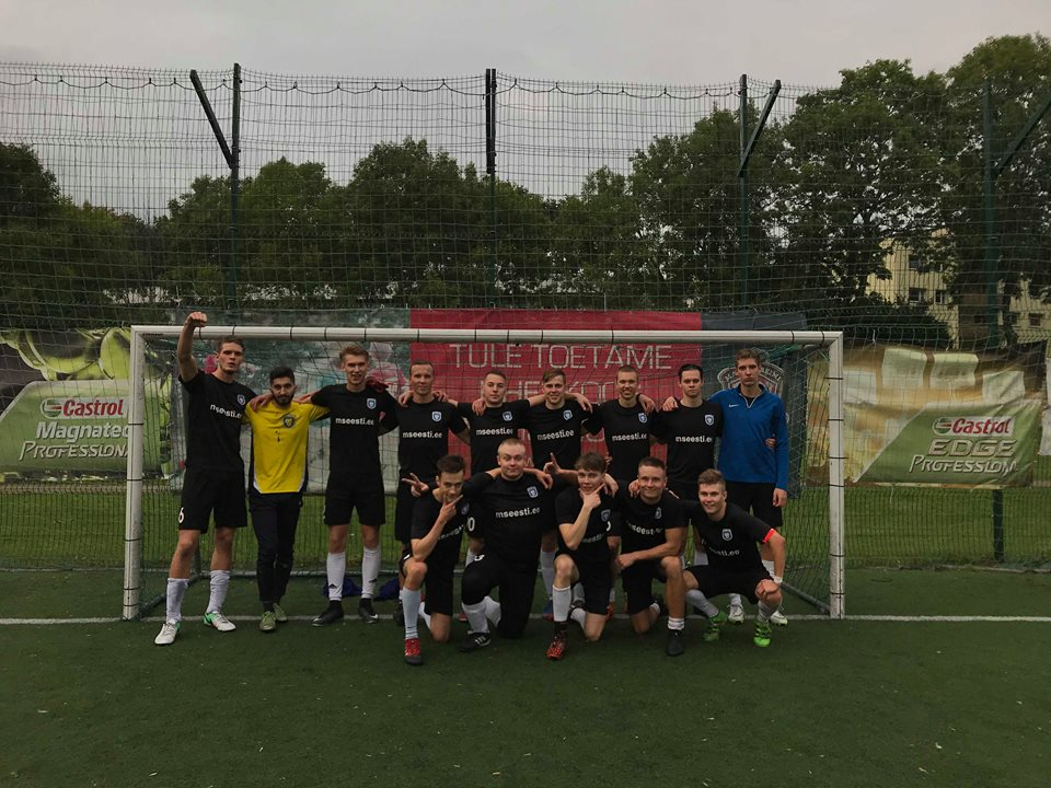 Viimsi Lõvide meeskond peale 2018.aasta esimest play-off mängu.